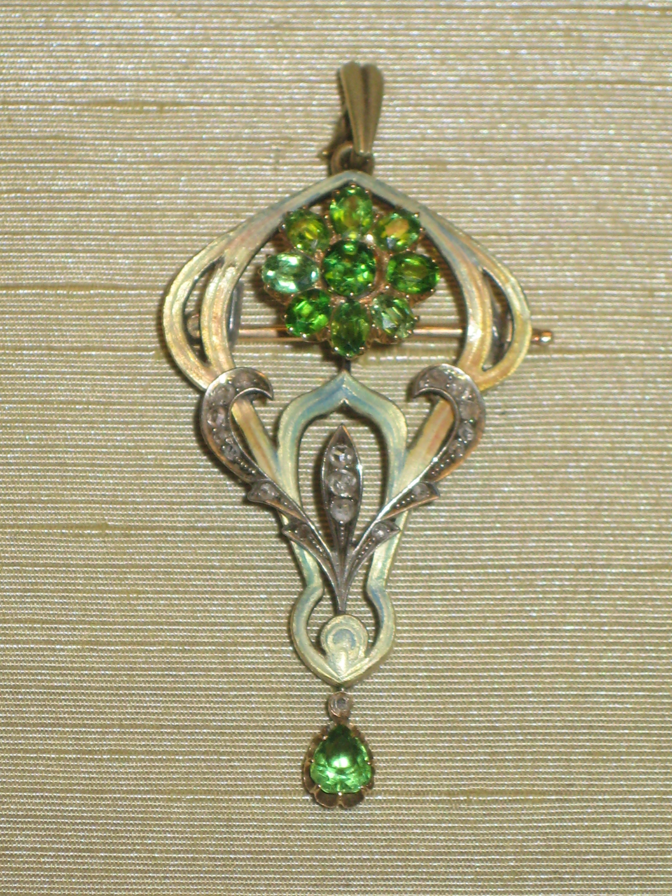 Брошь-кулон. Москва 1899-1908. Мастер-монограммист МВ. Собрание В. Кириченко. Демантоиды, алмазы